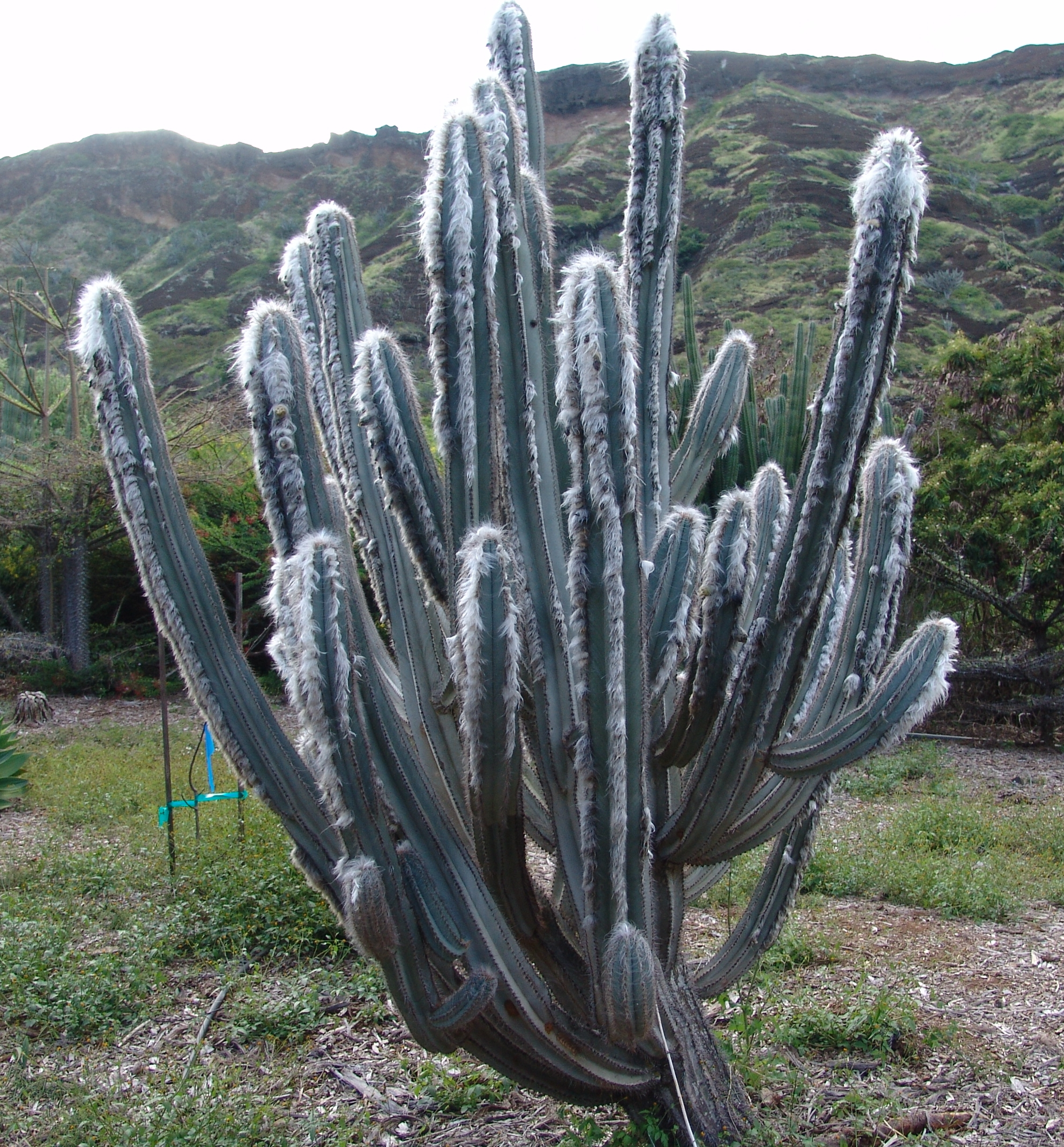 Koko Crater Botanical Garden Oahu Hawaii